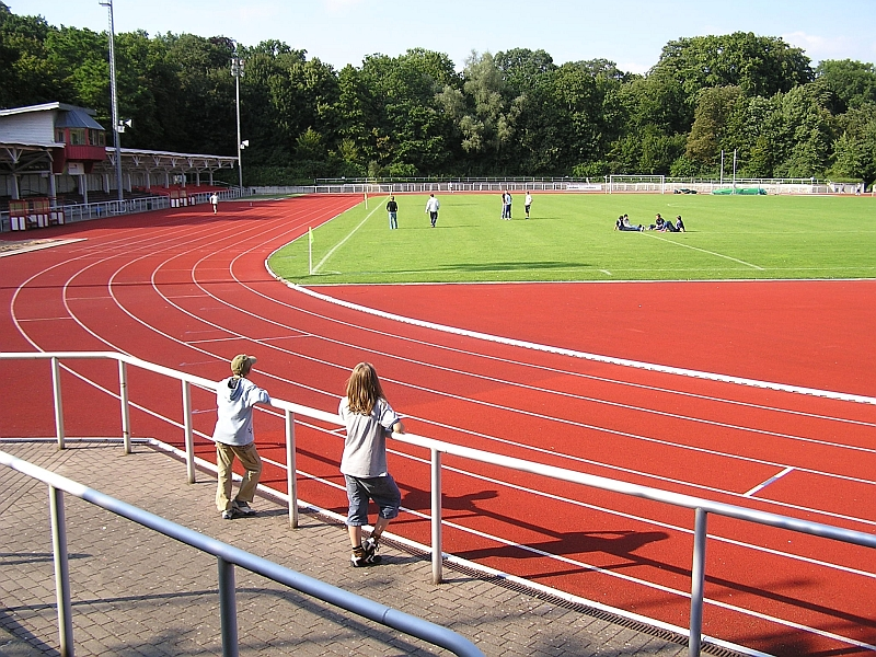 Das Weserstadion in Minden, Nordrhein-Westfalen.